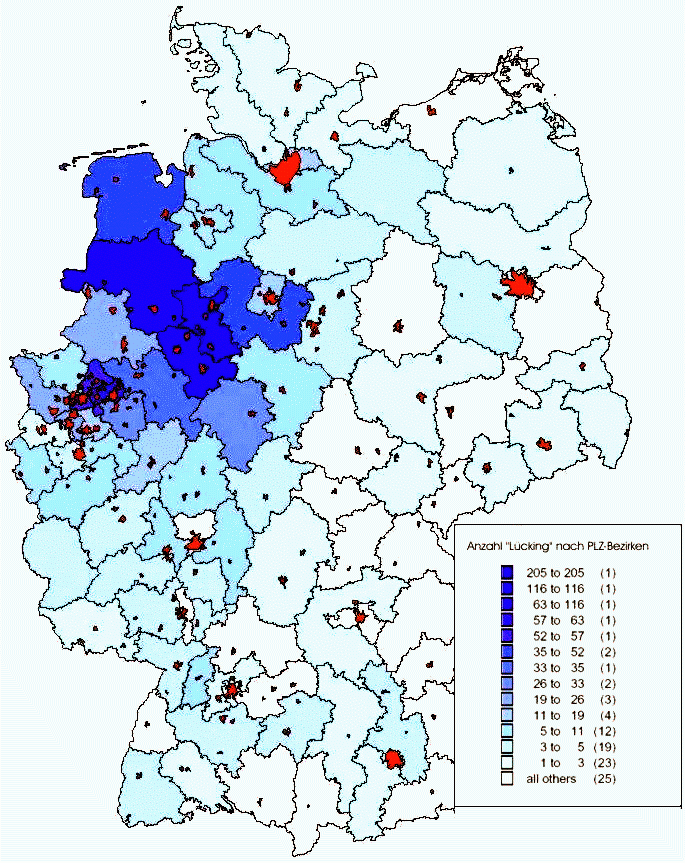 Karte über die Verbreitung des Namen Lücking GNU-FDL